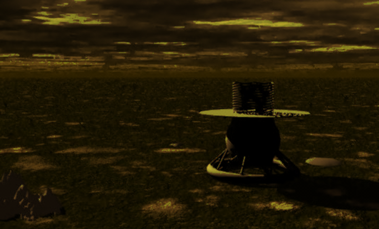 Umělecká představa sondy Věnera 9 na povrchu planety Venuše.